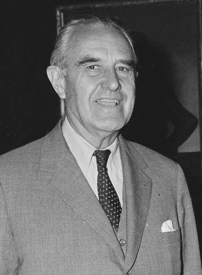 Collectie / Archief : Fotocollectie Anefo Reportage / Serie : [ onbekend ] Beschrijving : Minister Luns , Averill Hariman (Links) op zijn departement ontvangen Datum : 3 september 1965 Trefwoorden : DEPARTEMENTEN, ontvangsten Persoonsnaam : Averill Hariman, Luns, J.A.M.H., Luns, Joseph Fotograaf : Evers, Joost / Anefo Auteursrechthebbende : Nationaal Archief Materiaalsoort : Negatief (zwart/wit) Nummer archiefinventaris : bekijk toegang 2.24.01.03 Bestanddeelnummer : 918-1379